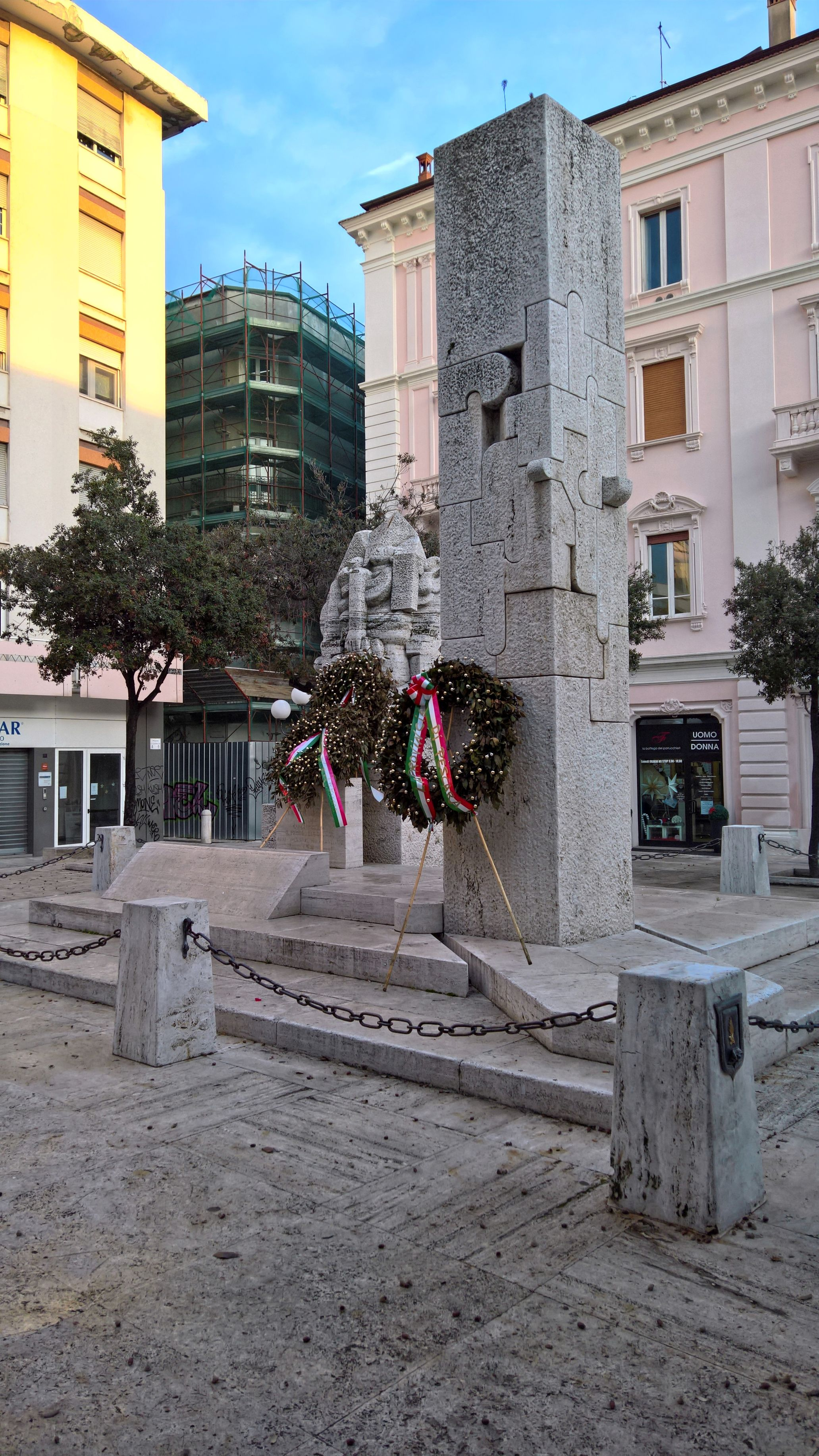 Pescara 2018